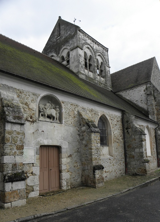 Église de Sablonnières (77).